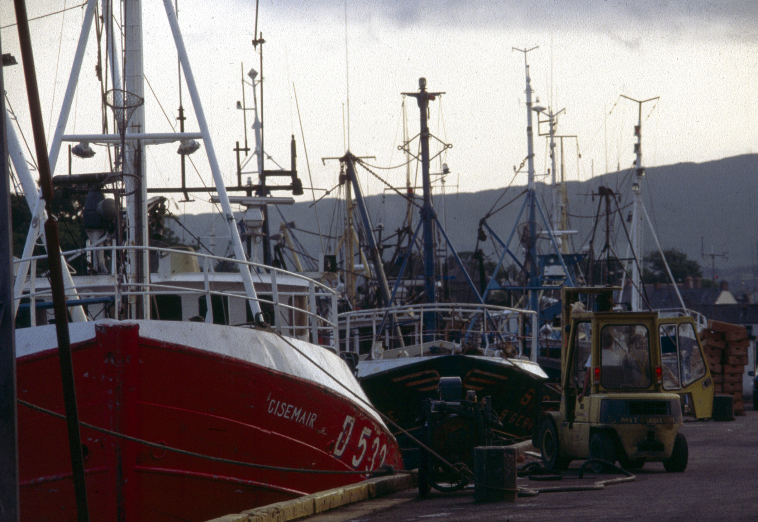 Castletownbere